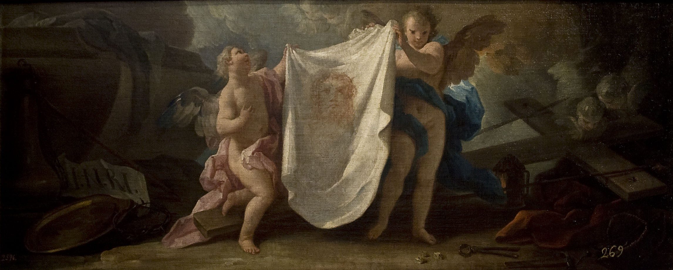 Dos àngels sostenen el llenç amb la Santa Faç. A dreta i esquerra el sepulcre i els instruments de la Passió, és a dir, els "Arma Christi".